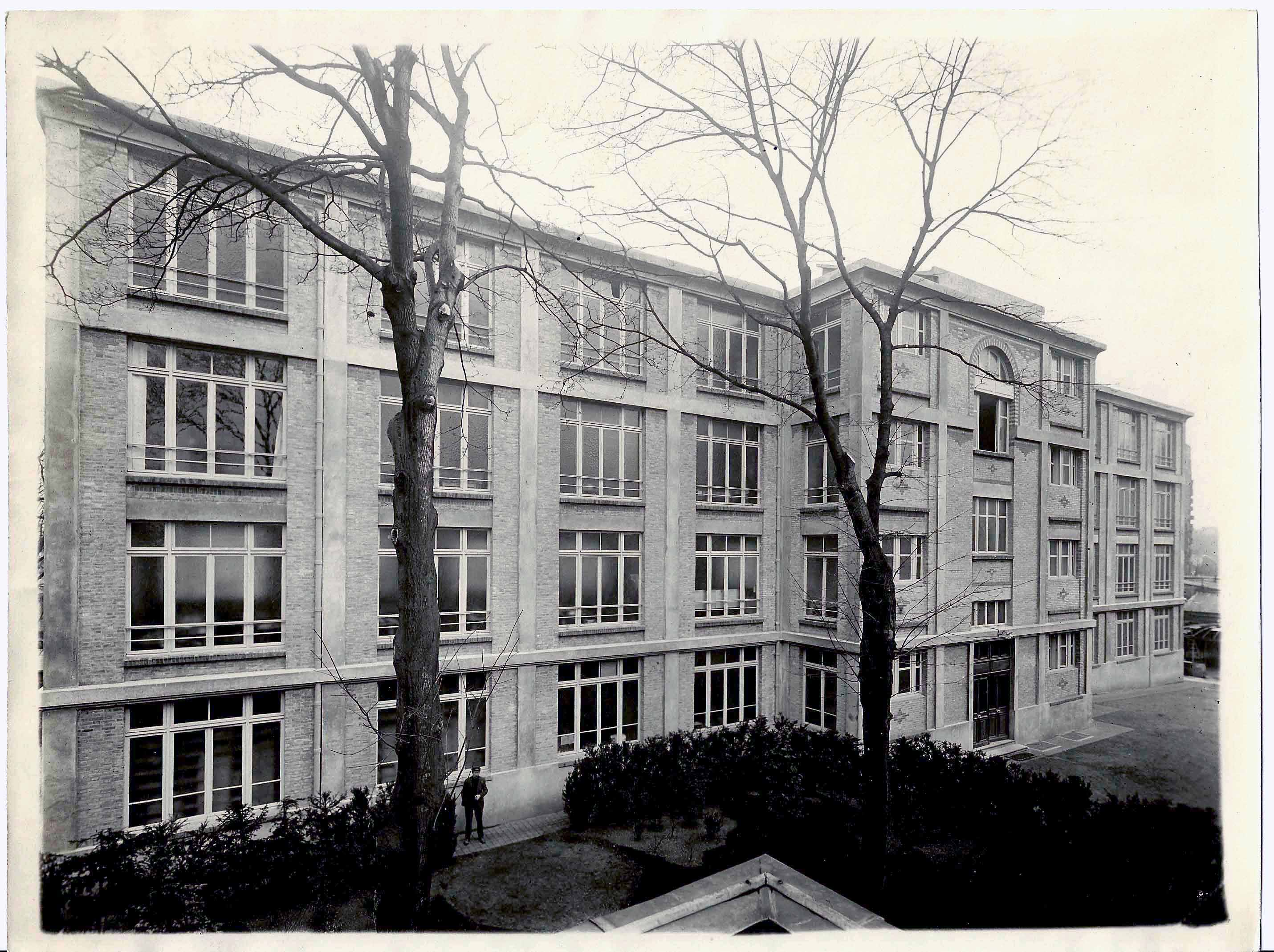 immeuble 69 boulevard Exelmans